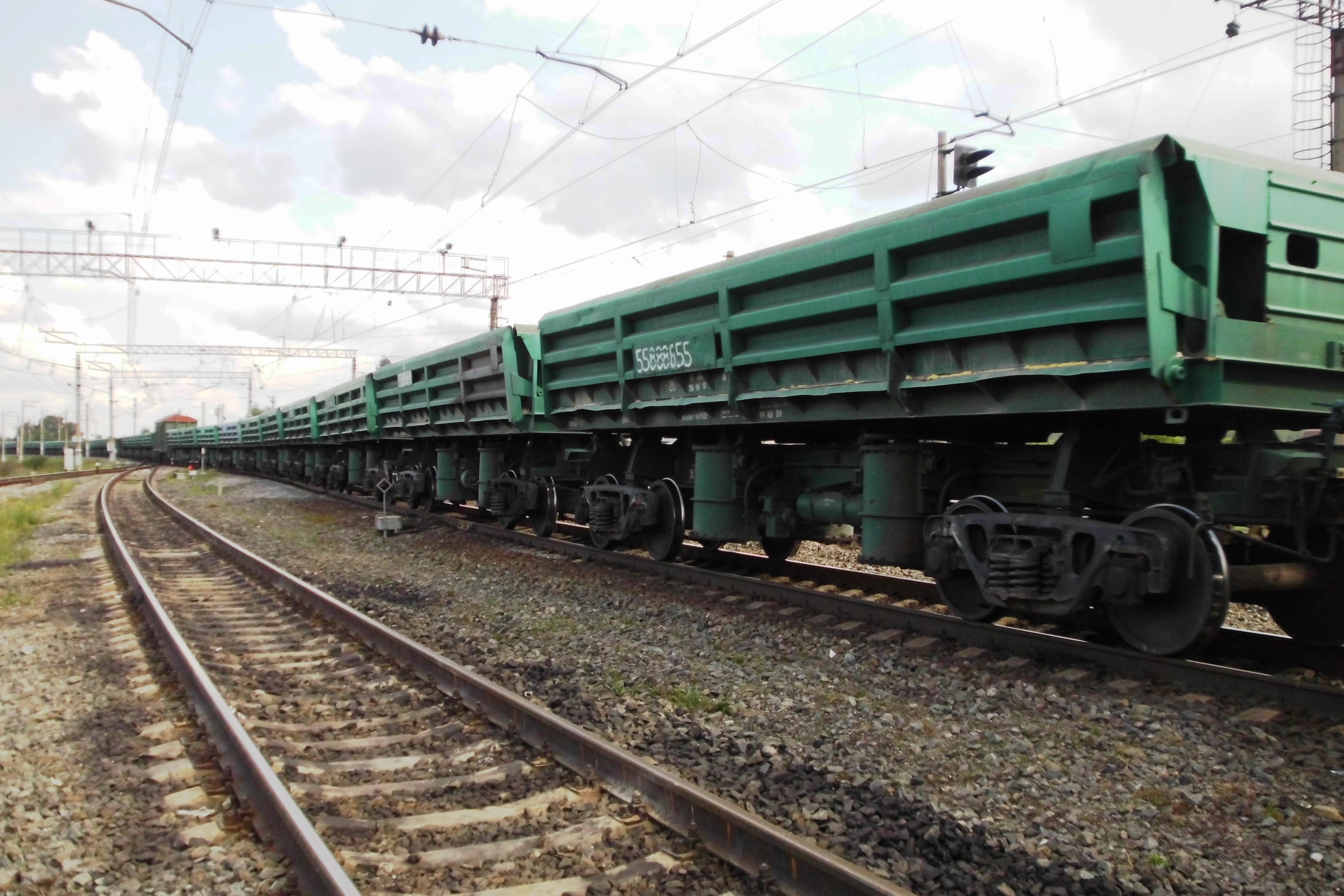 Думпкары в составе грузового поезда (Разъезд № 2 - ст. Металлургическая) перевозящего руду (сырьё) с Каринского гипсового месторождения на завод "Кнауф-гипс". Между думпкарами вагон сопровождения для охраны приспособленный из крытого вагона.